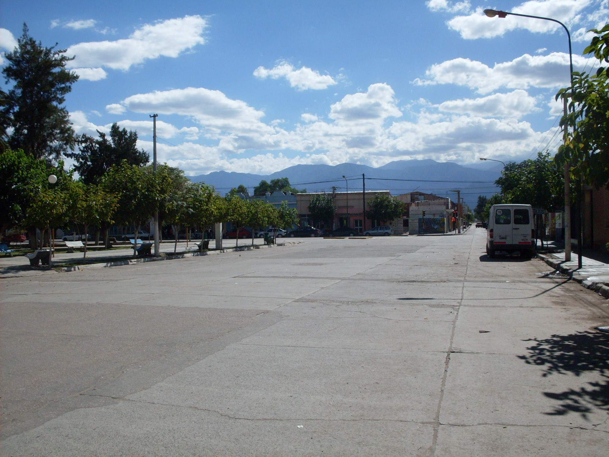 Centro de la ciudad de Tinogasta, Catamarca, Argentina.